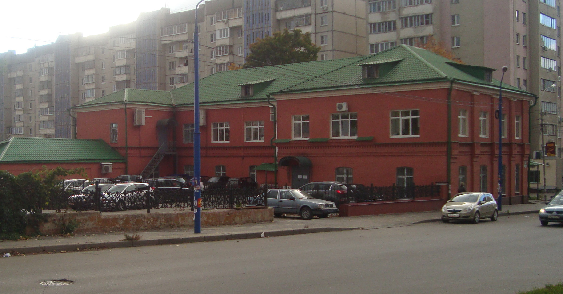 Липецк. Улица Горького, 2